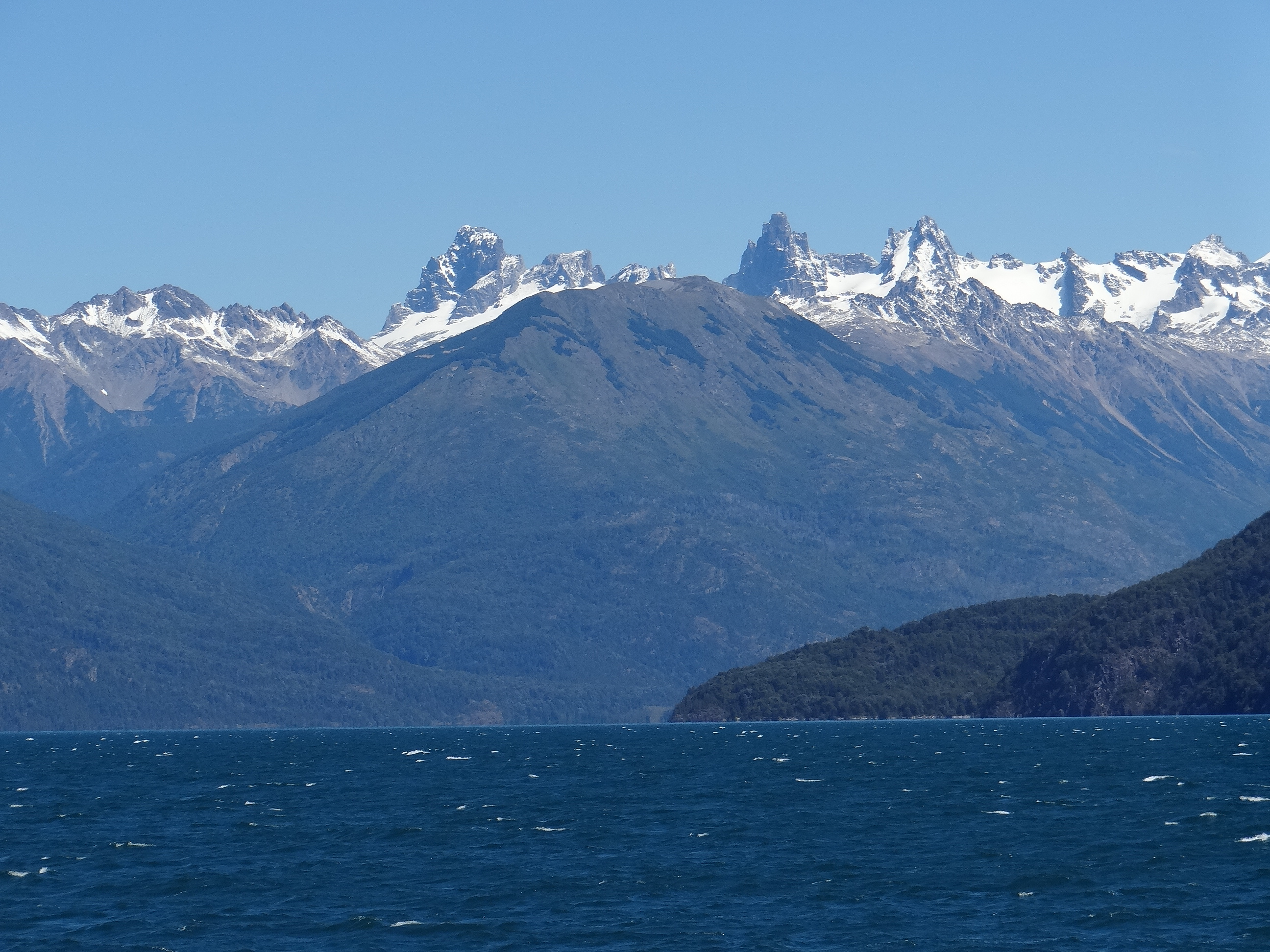 Cerro Tres Picos detrás del Lago Puelo